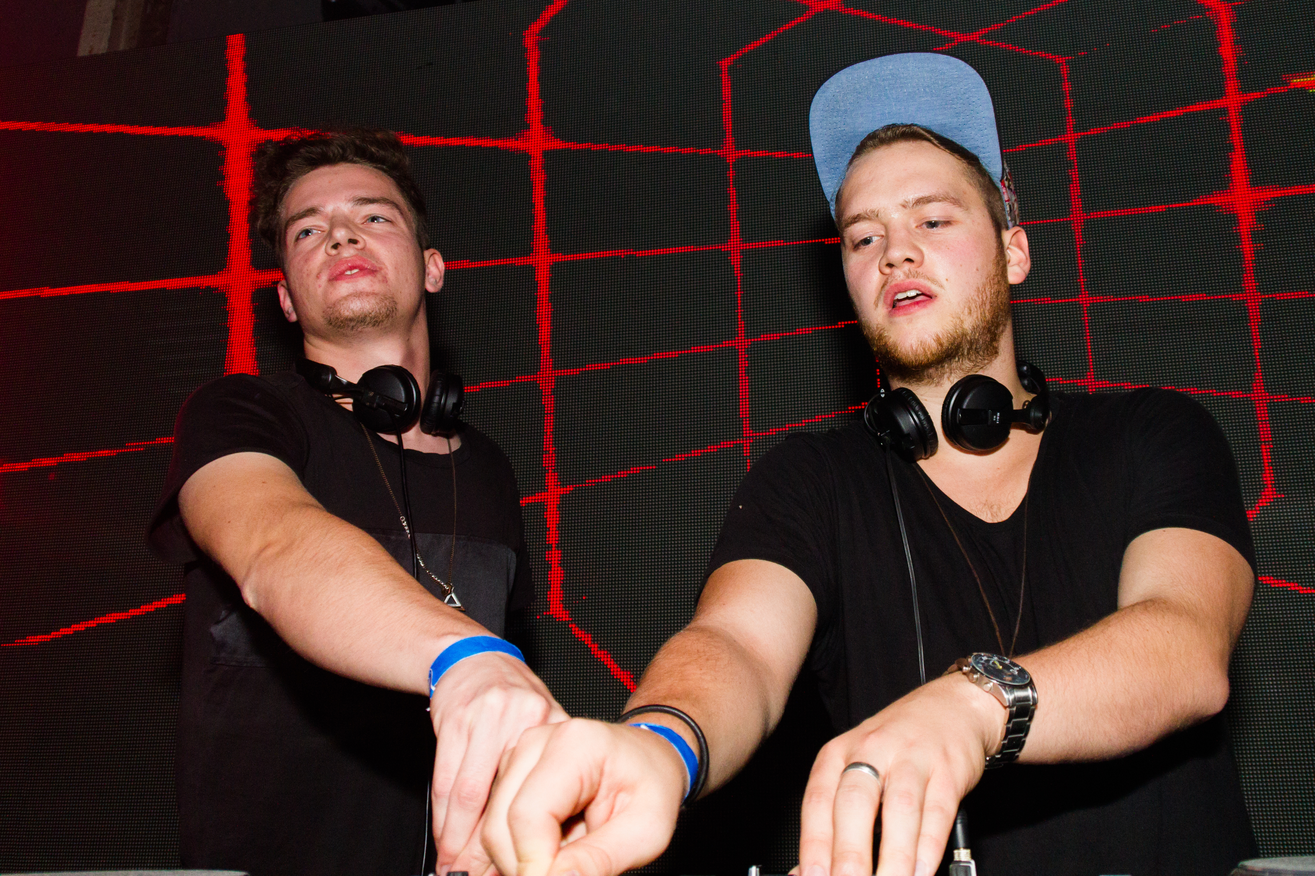 Auf dem Bild zusehen das DJ- und Produzentenduo Younotus aus Berlin, bestehend aus Tobias Bogdon und Gregor Sahm. Hier Live auf der Geburstagsfeier von Thomas Lizzara & Stereo Express am 24.10.2015 im Berliner Club Haubentaucher.